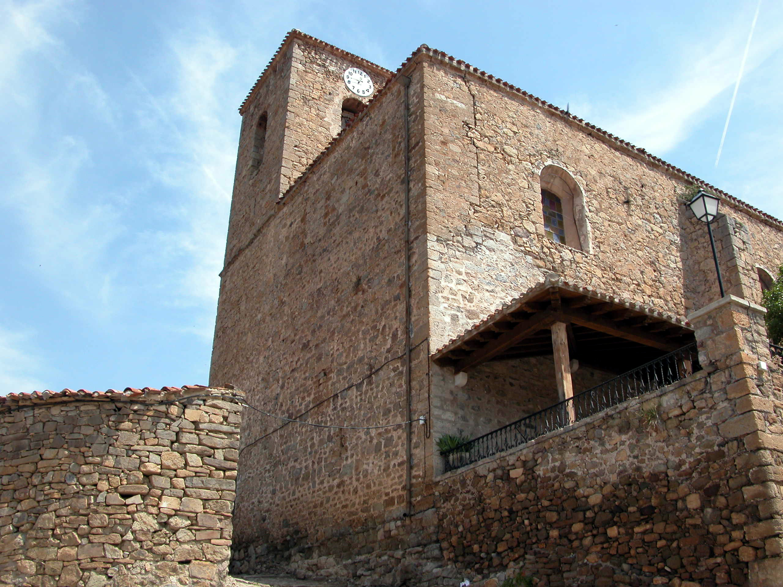 Iglesia de la Asunción en San Román de Cameros (La Rioja - España)